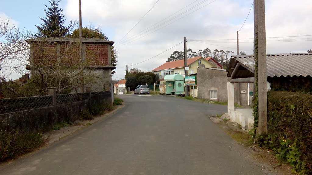 Visa da Fontenova, Magalofes.